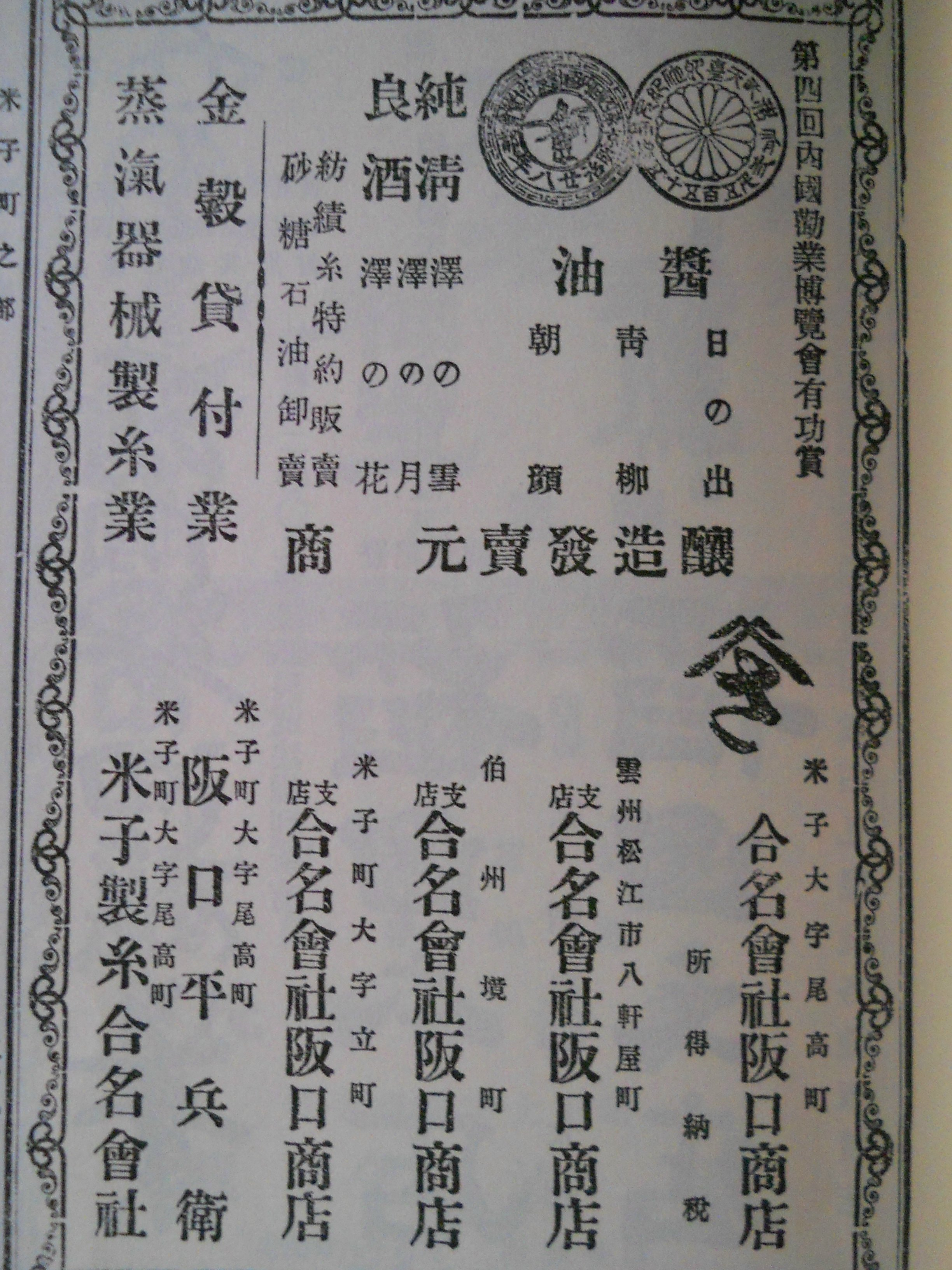 Ｓａｋａｇｕｃｈｉ Ｓtore